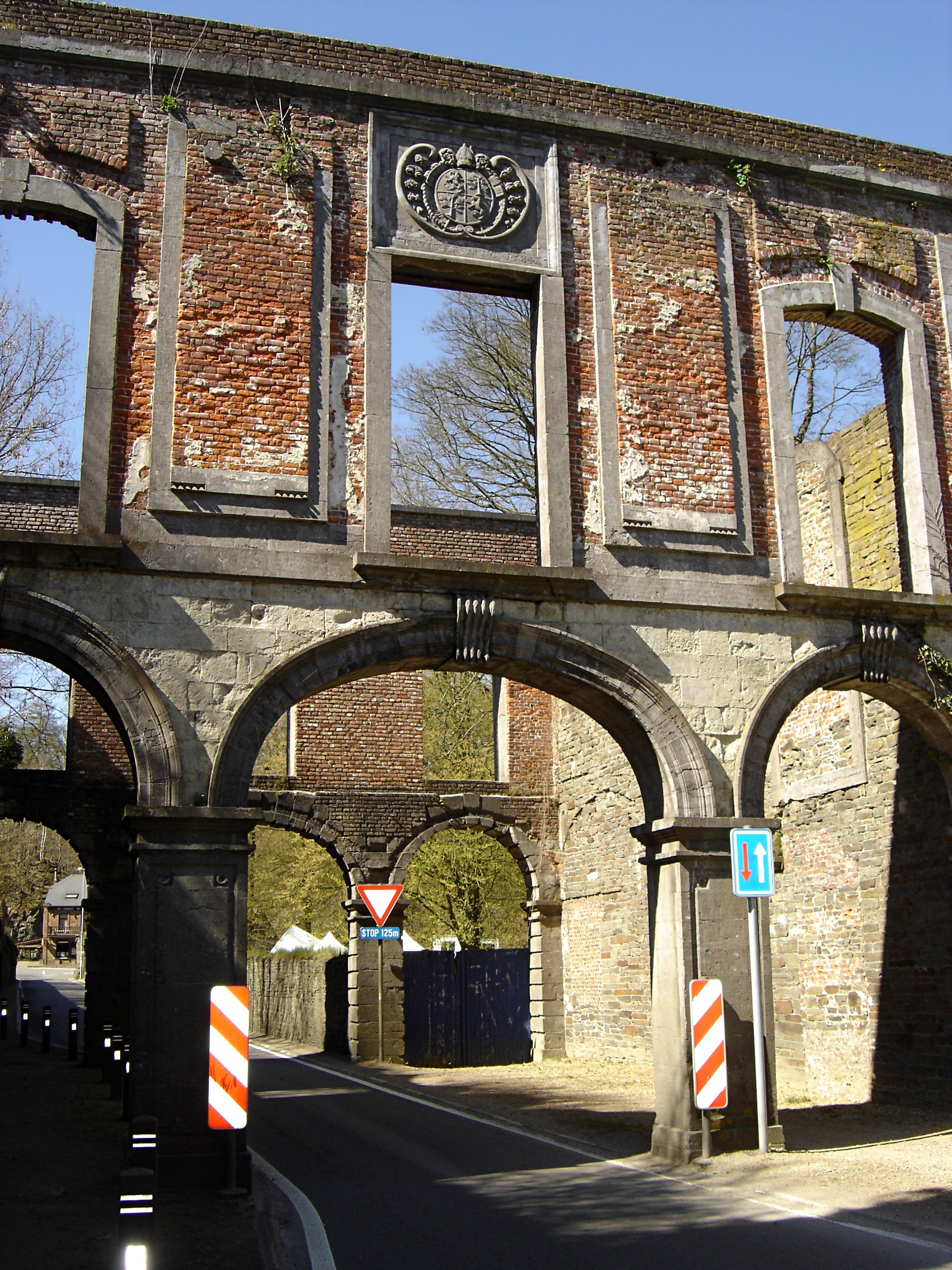 Belgique - Brabant wallon - Villers-la-Ville - ancienne pharmacie de l'Abbaye (photo 2007, avant l'effondrement de novembre 2013)